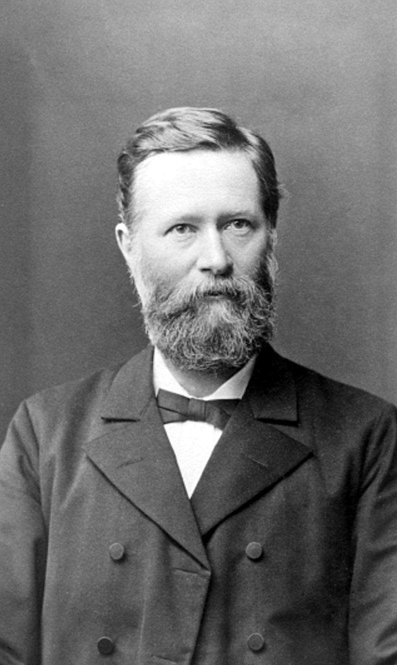 Friedrich Wilhelm Franz Nippold (1838-1918) deutscher Kirchenhistoriker